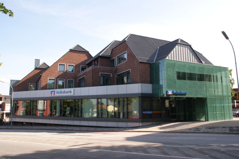 Hauptsstelle der Volksbank Lübbecker Land eG in Lübbecke